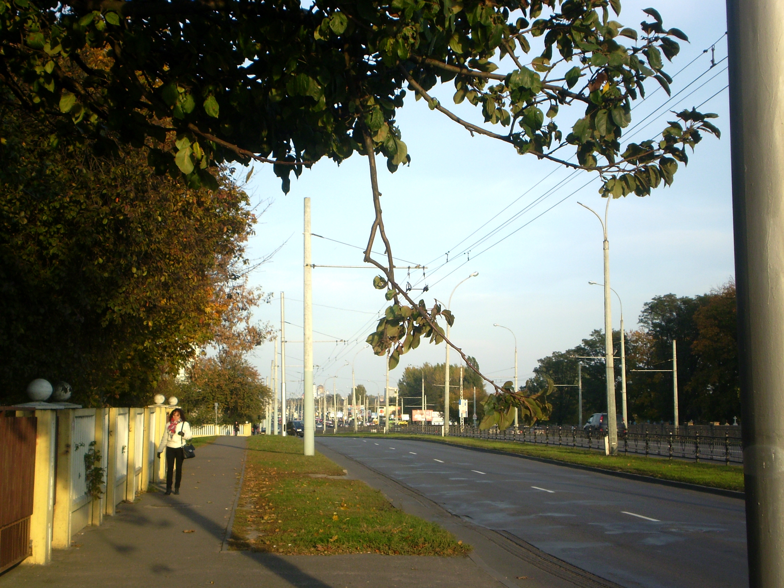 Вул. Маскоўская